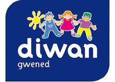 Logo Skol Diwan Gwened